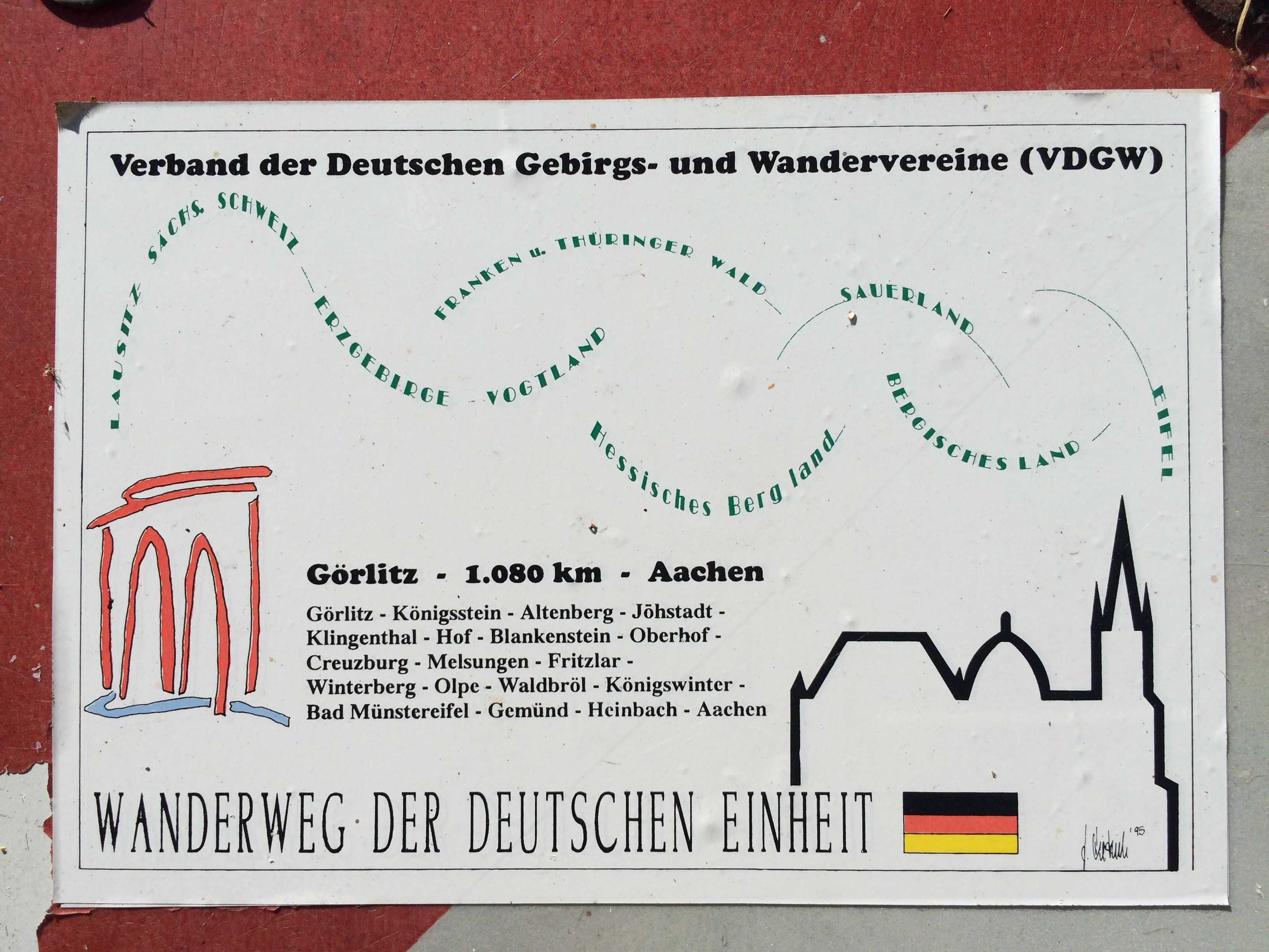 Wegzeichen des Wanderweges der Deutschen Einheit, gefunden in Wichmannshausen